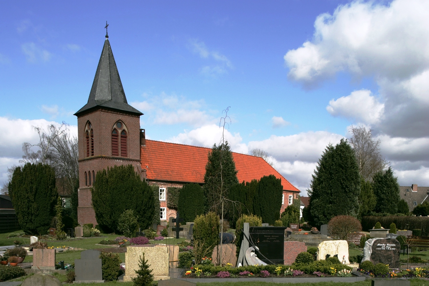 St.-Nicolai-Kirche Elsfleth